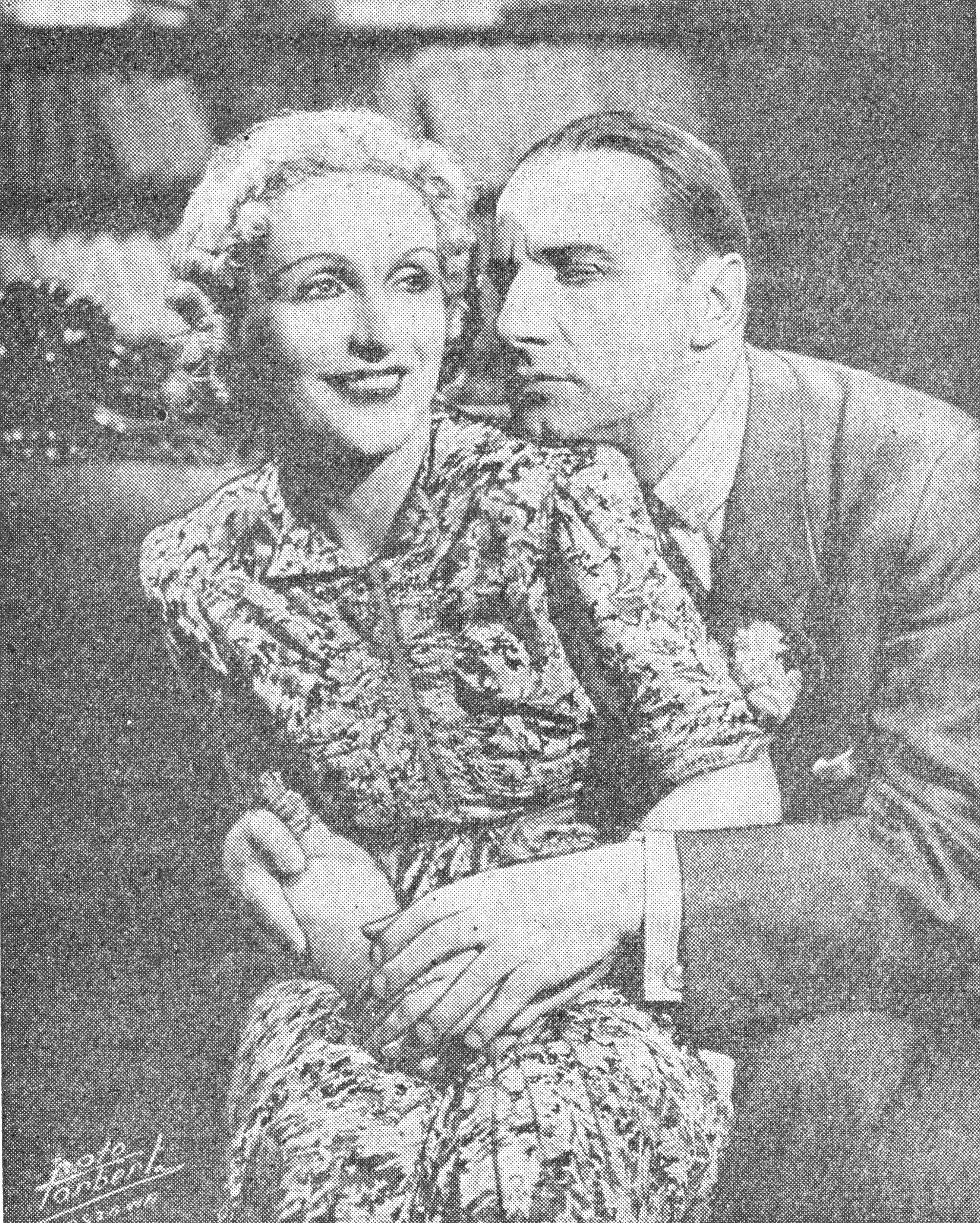 Kazimiera Skalska I Wojciech Ruszkowski w "No, no. Nanette", 1933